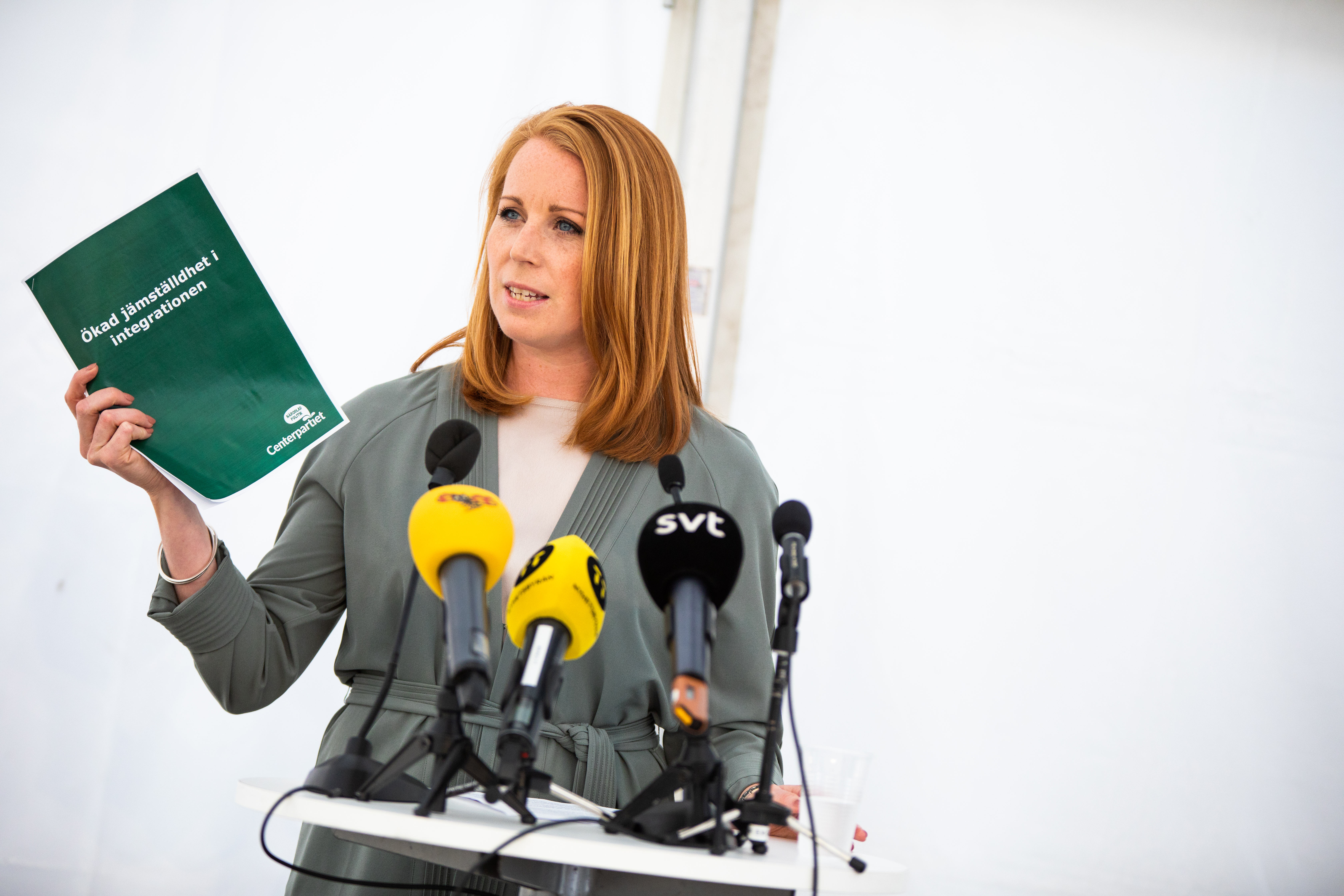 2018-06-11 Tal och PK på Järvaveckan